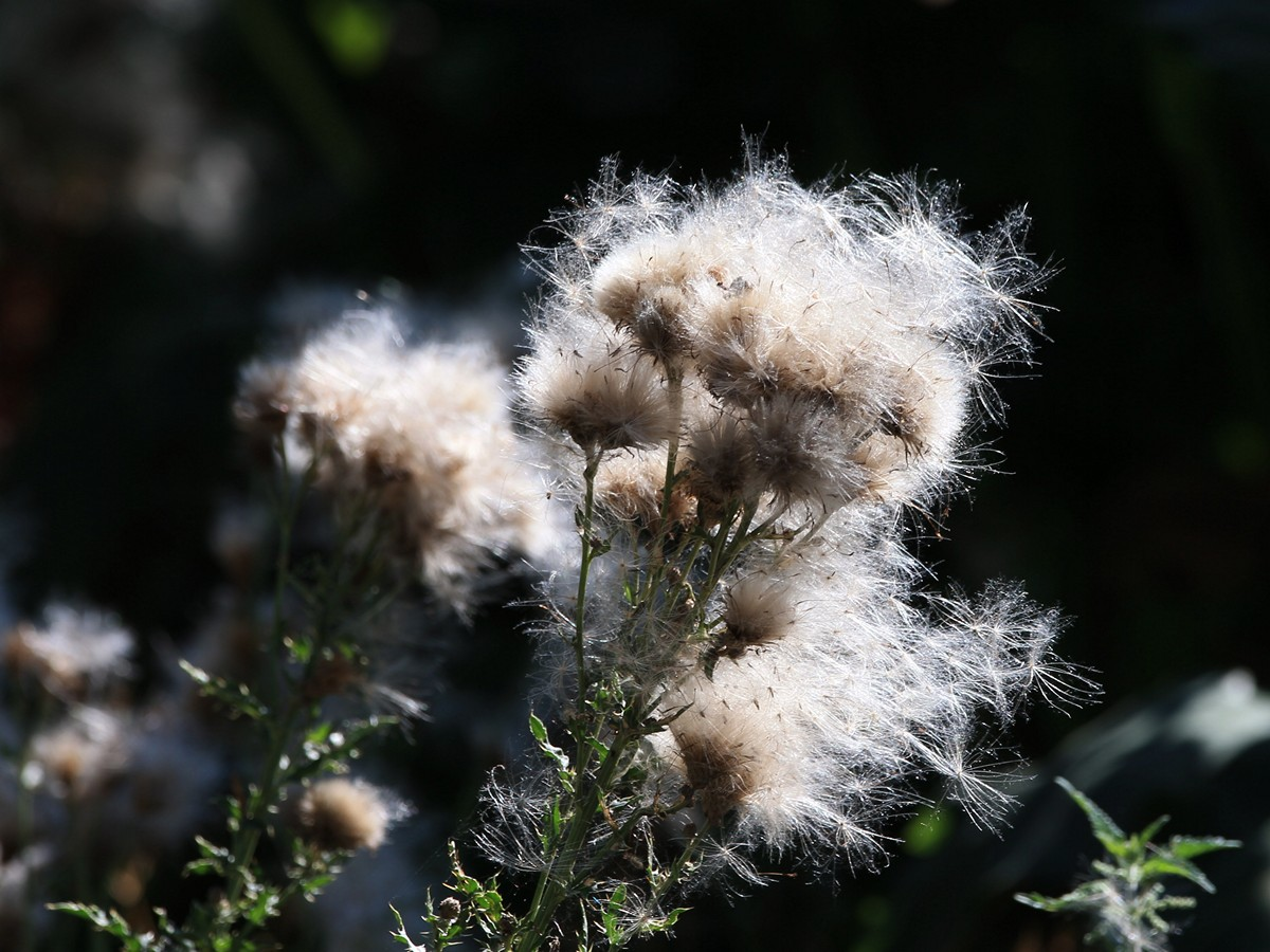 Distelsamen in Mecklenburg